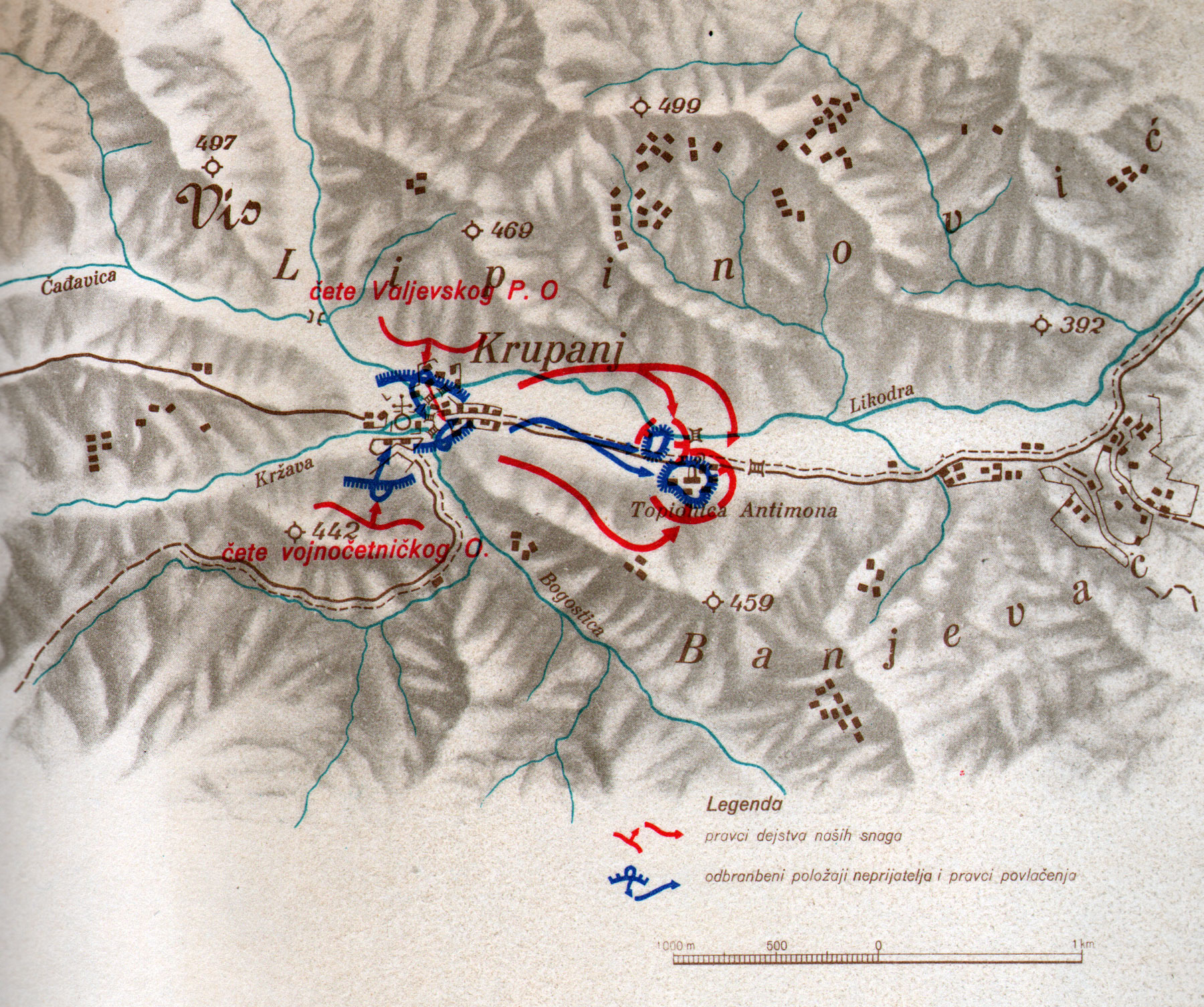 Srpskohrvatski / српскохрватски: Oslobođenje Krupnja (od 1 do 3 septembra 1941 godine)